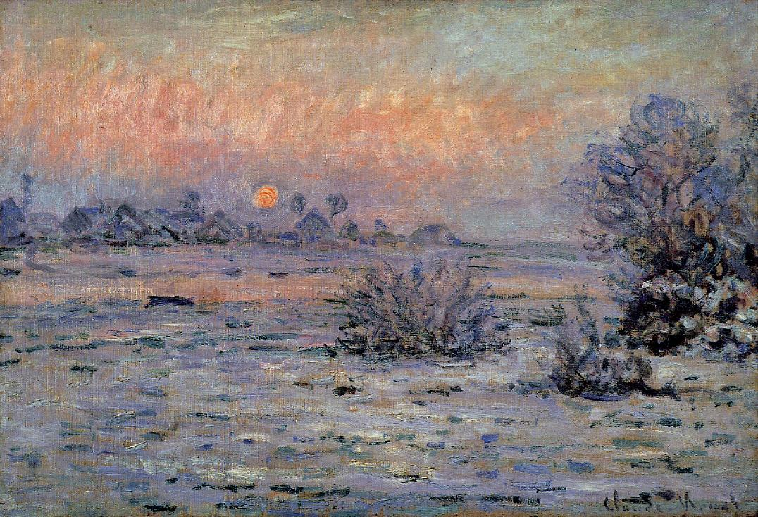 Soleil d'hiver à Lavacourt, Claude Monet, huile sur toile, 55 x 81 cm, Musée d'art moderne André Malraux, Le Havre, France.